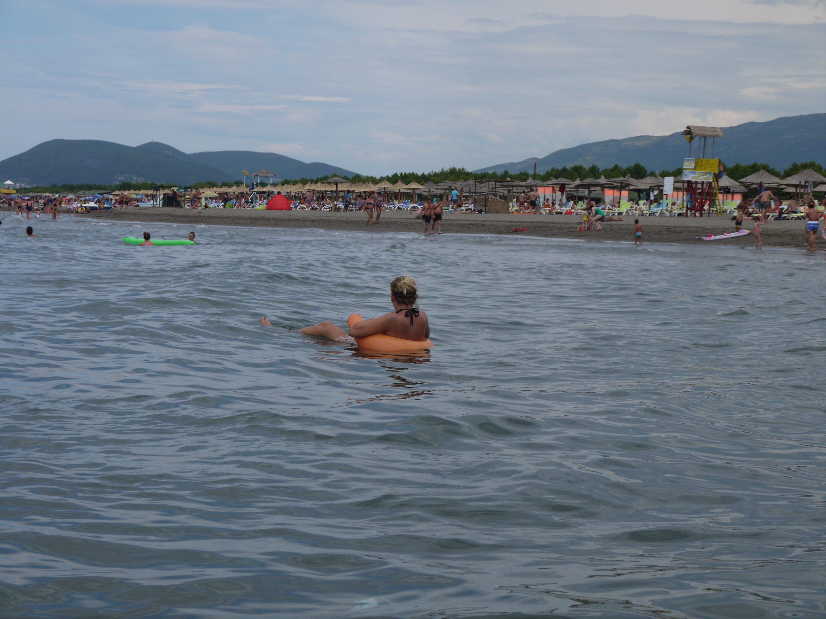 Czarnogóra - Ulcinj - Wielka Plaża